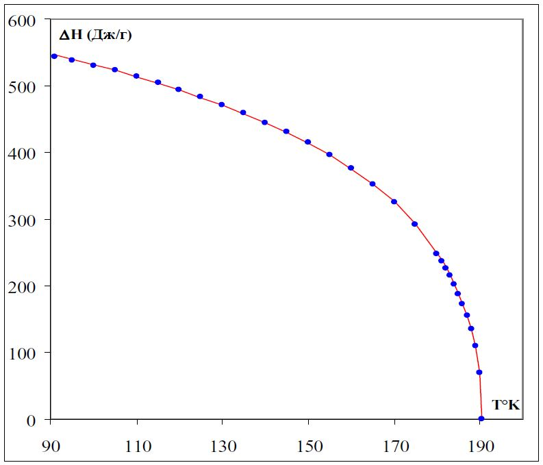 Зависимость удельной энтальпии испарения метана от температуры. Точки - эксперимент, кривая - формула